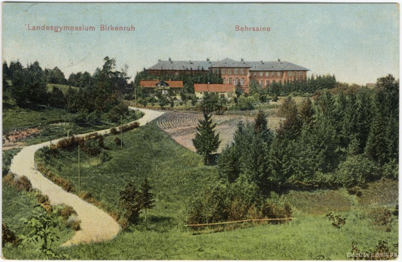 Gymnasium Kaiser Alexanders II. zu Birkenruh bei Wenden (1915)